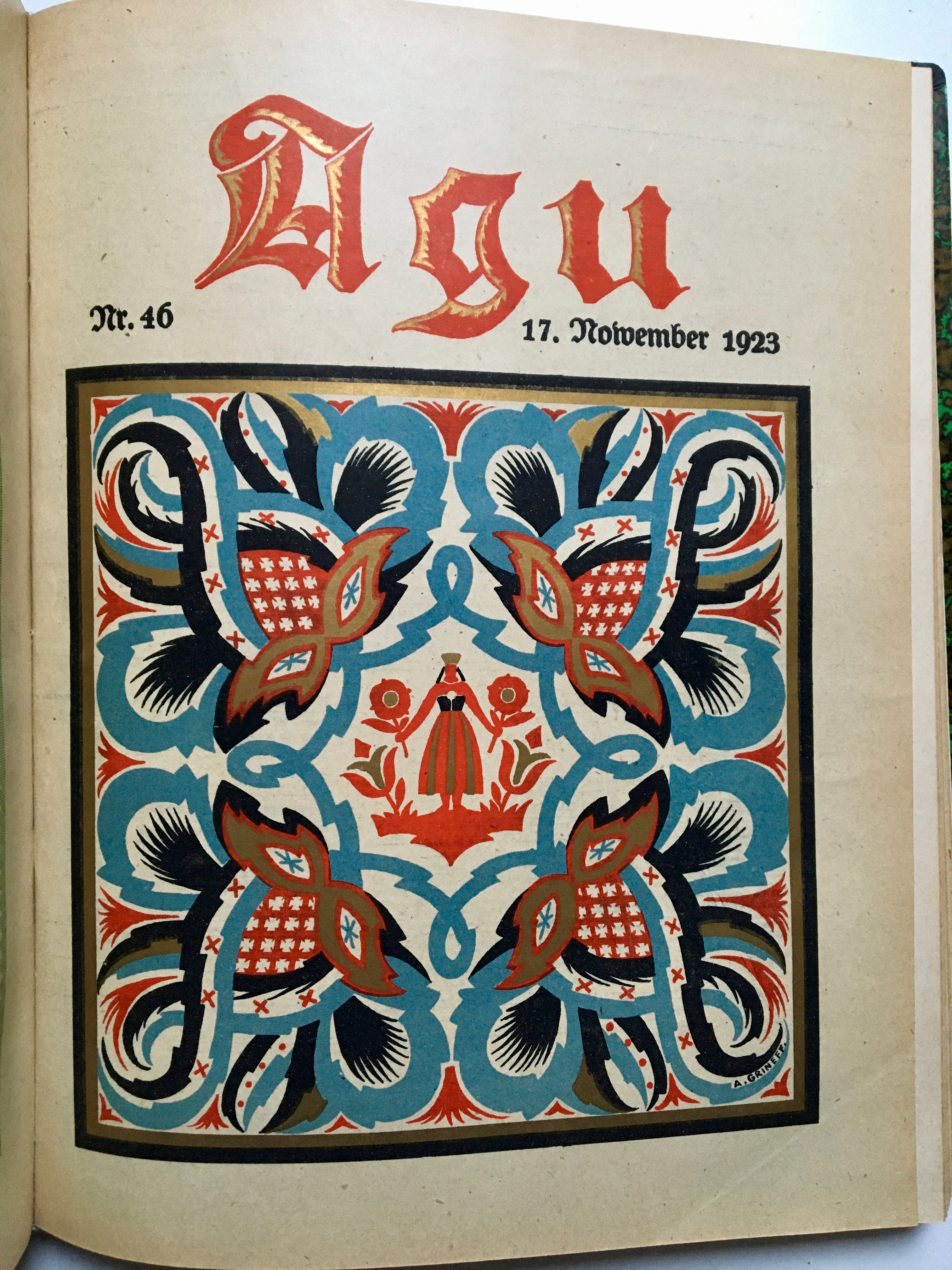 Agu esikaas Grineffilt 1923